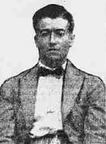 L'immagine dell'ingegnere Adolfo Prasso pubblicata dal quotidiano La Stampa del 9 luglio 1936